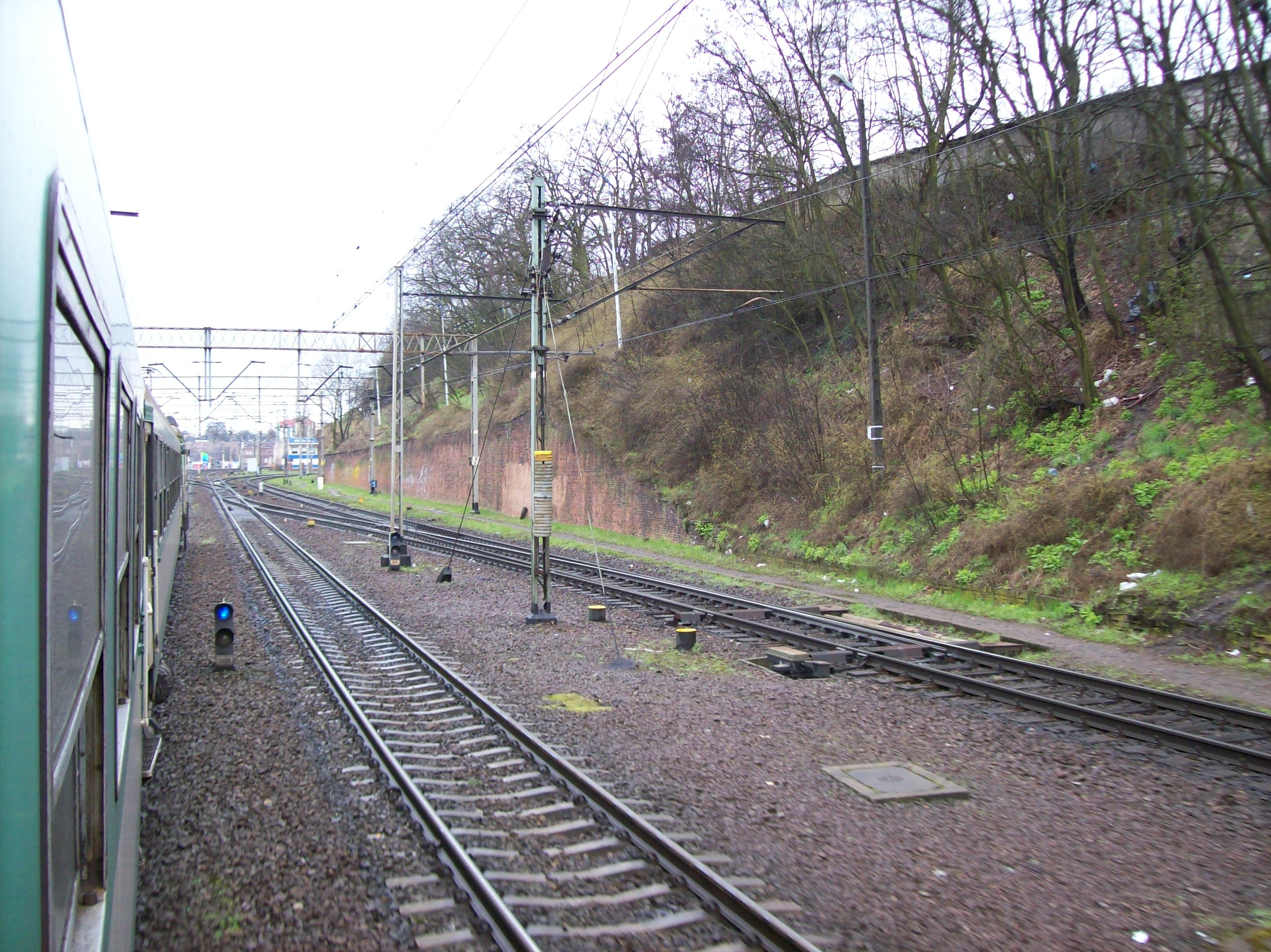 Linia kolejowa 351 okolice Szczecina Gł.